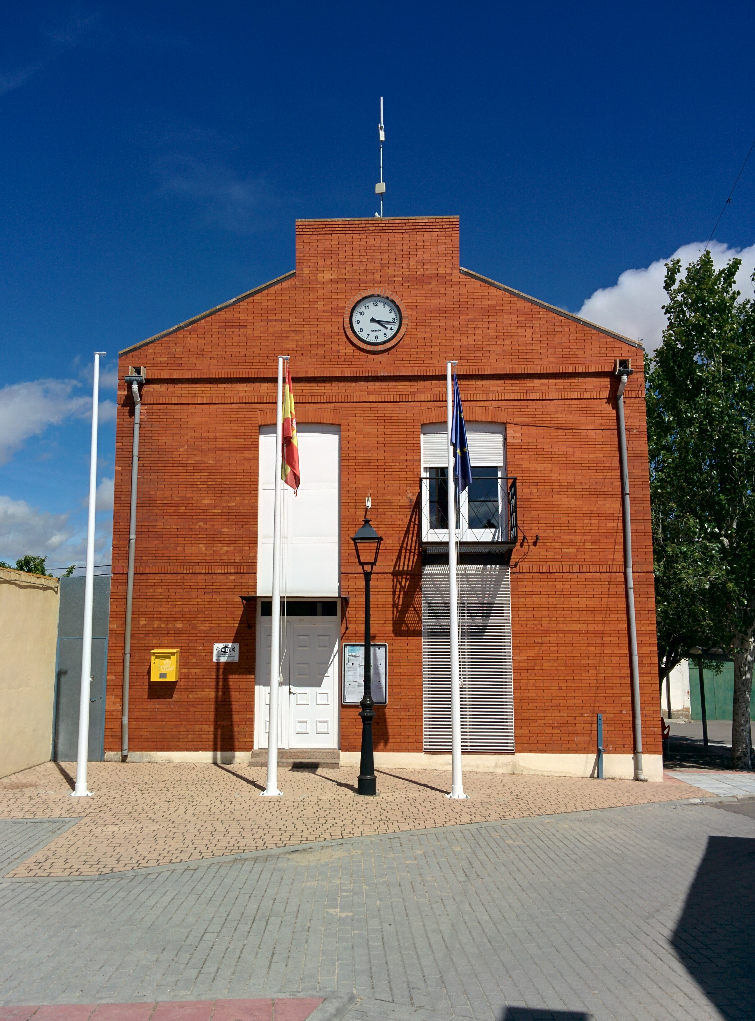 Casa consistorial de Velascálvaro (Valladolid, España).